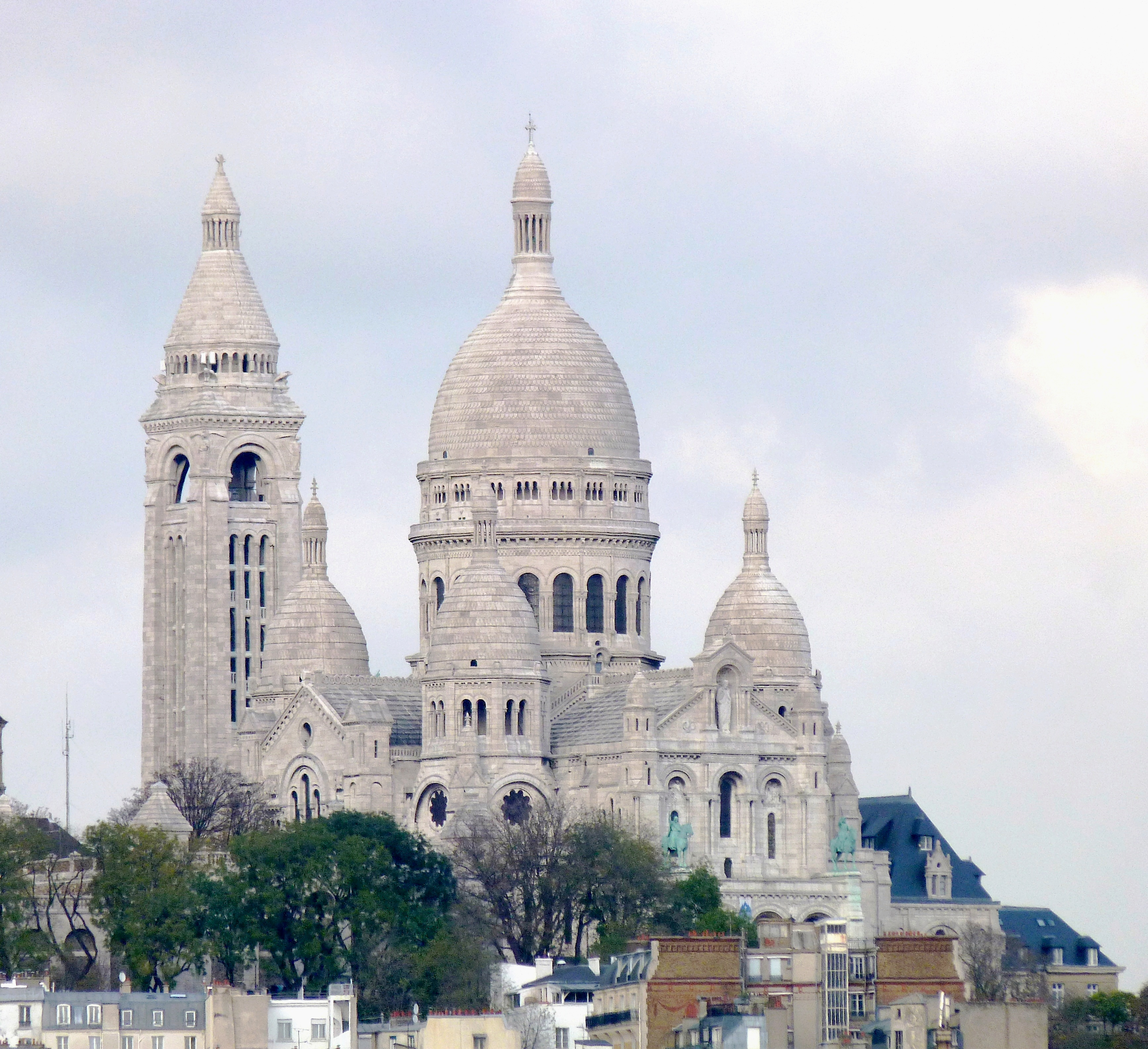 Basilique du Sacré-Cœur-de-Montmartre, Paris (18e arrondissement). Vue au téléobjectif depuis la terrasse des Galeries Lafayette.